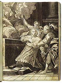 Grabado del Inquisidor Pedro Arbués, que fue considerando santo y martir, realizado por Pedro Villafranca (1664).